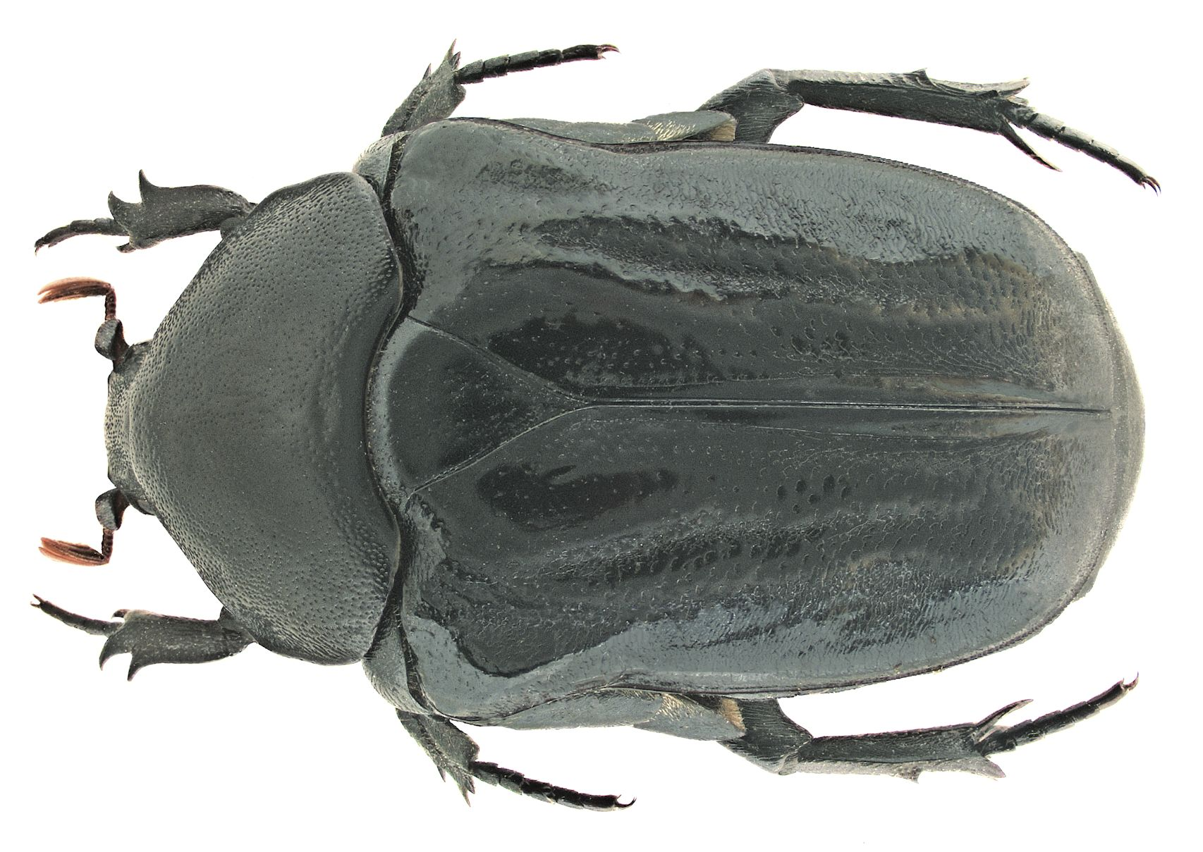 Familie: Scarabaeidae Grösse: 24 mm Fundort: Senegal, M`Bour leg.det. U.Schmidt, 1992 Foto: U.Schmidt, 2006